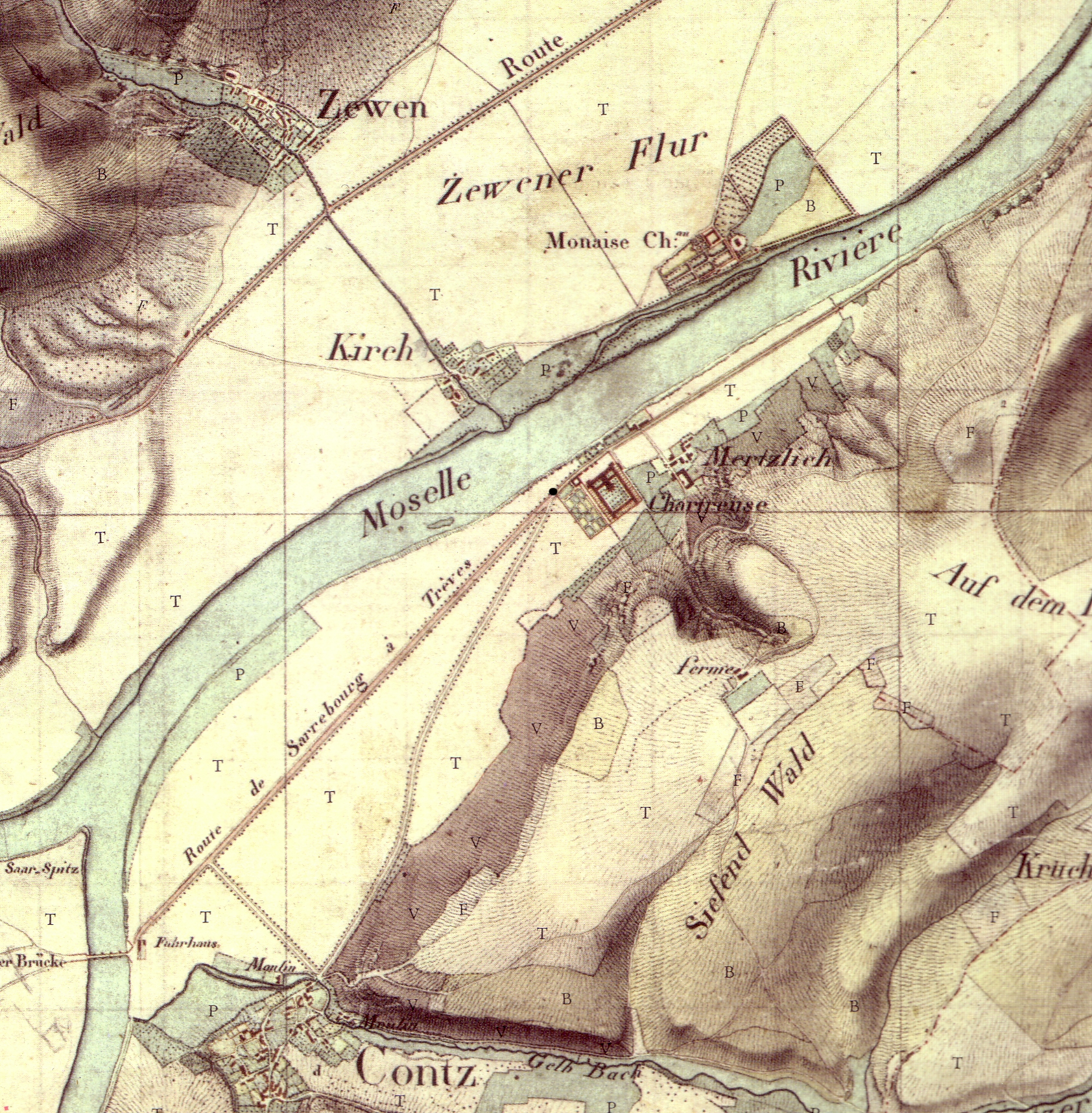 Die Gebäude des Roscheider Hofs (als "ferme" bezeichnet) oberhalb der Kartause und des Ortes Mertzlich (heute Konz-Karthaus)